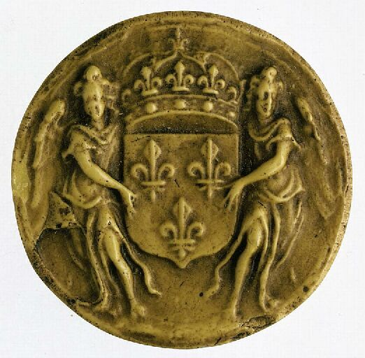 Moulage du contre-sceau du grand sceau de Louis XIV, roi de France. Sceau anépigraphe.